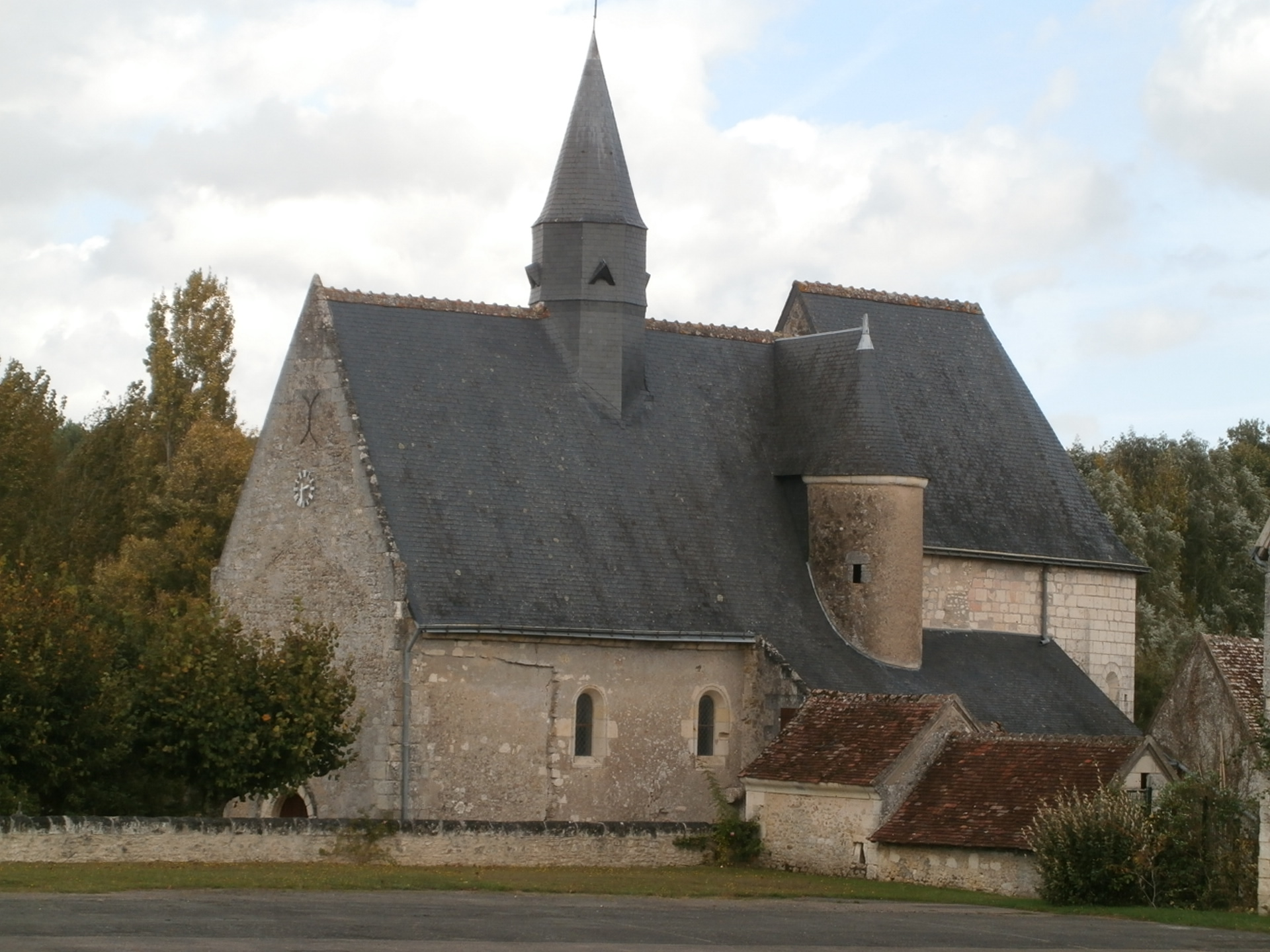 Église Saint-Gilles de Ferrière-sur-Beaulieu